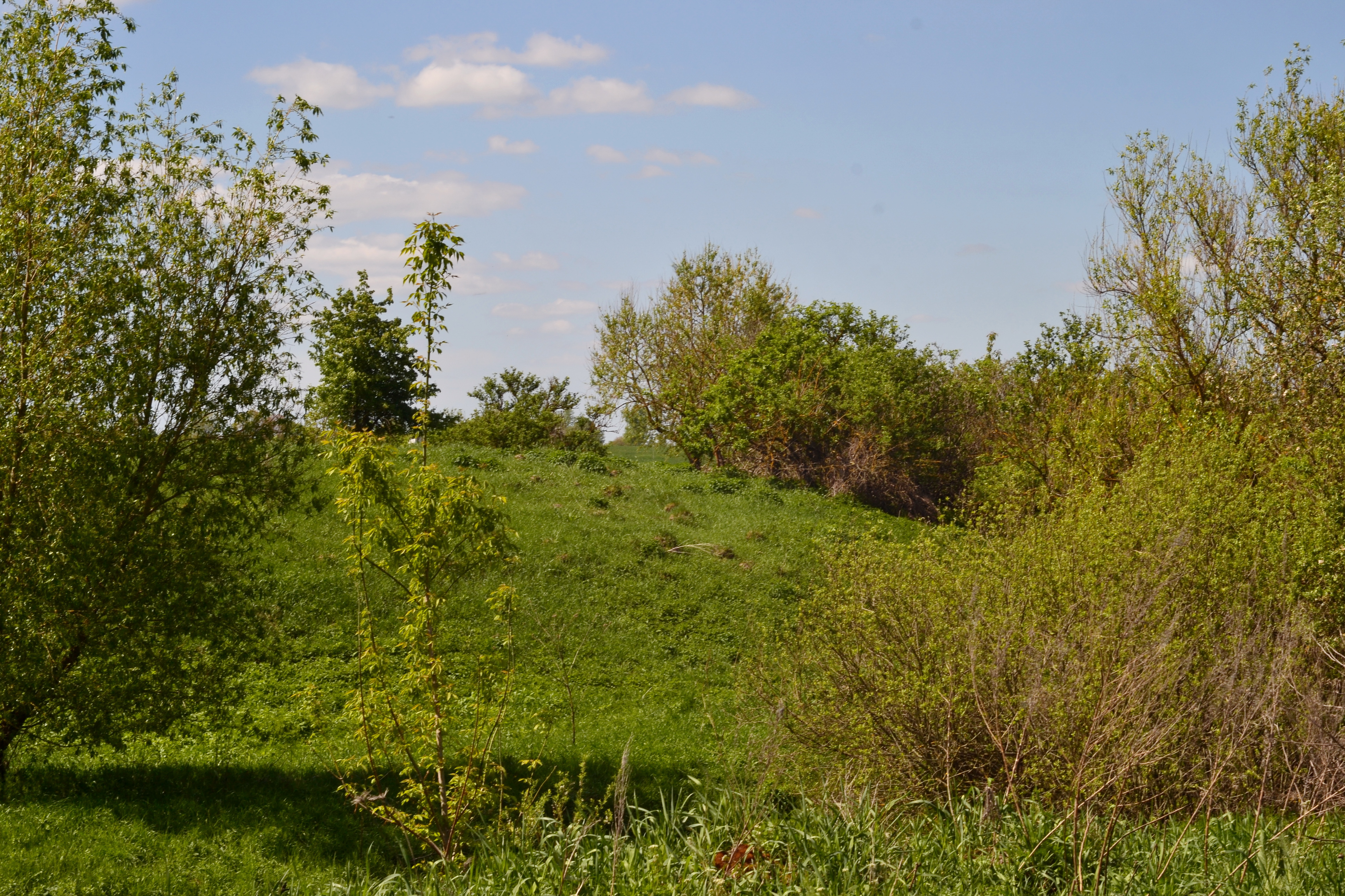 Іванчиці-8, поселення багатошарове: доба бронзи і давньоруського часу (Х—ХІІІ ст.) - Іванчиці (в південній частині села, на правому березі р. Серна) Рожищенський район Волинська область Україна